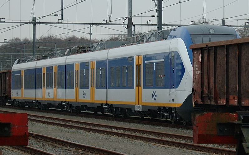 Sprinter Light Train 2402 na aankomst te Amersfoort